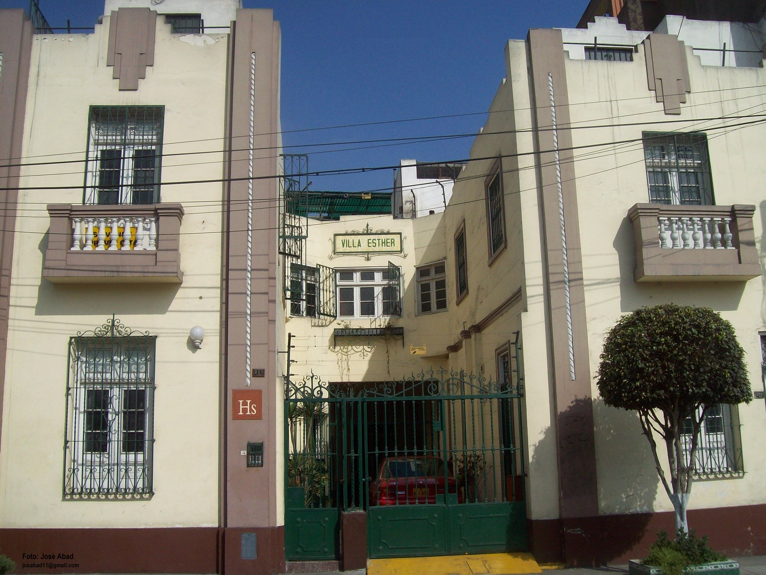 Villa Esther en la tercera cuadra del jirón Breña.